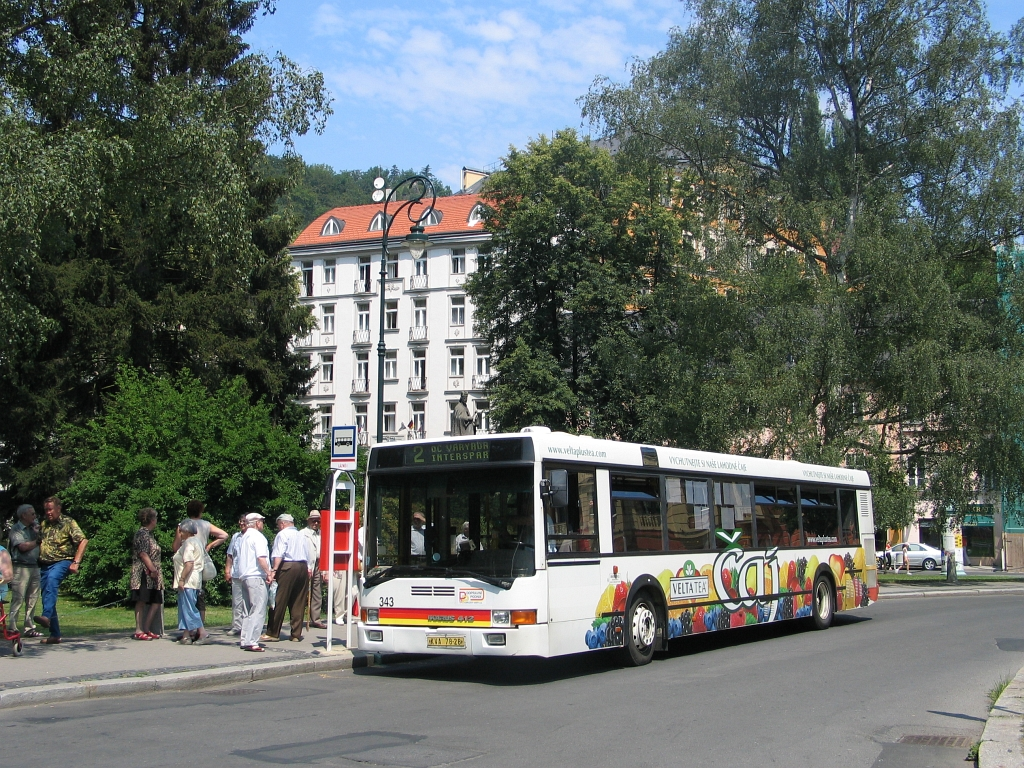 Ikarus 412, Karlovy Vary, bus station Lázně I., Sady Karla IV.